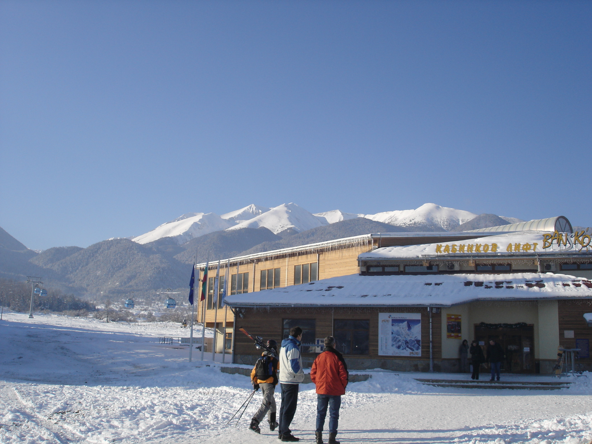 Lift Station in Bansko, Bulgaria